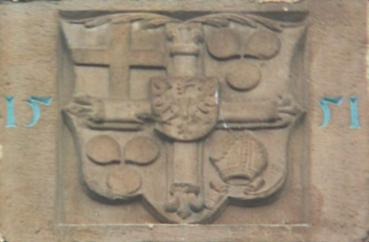 Wappen von Wolfgang Schutzbar (* 1483; † 1566, Hochmeister des deutschen Ordens) am Bergfried des Stadtschlosses in Neckarsulm, Deutschland - Datiert auf das Jahr 1551